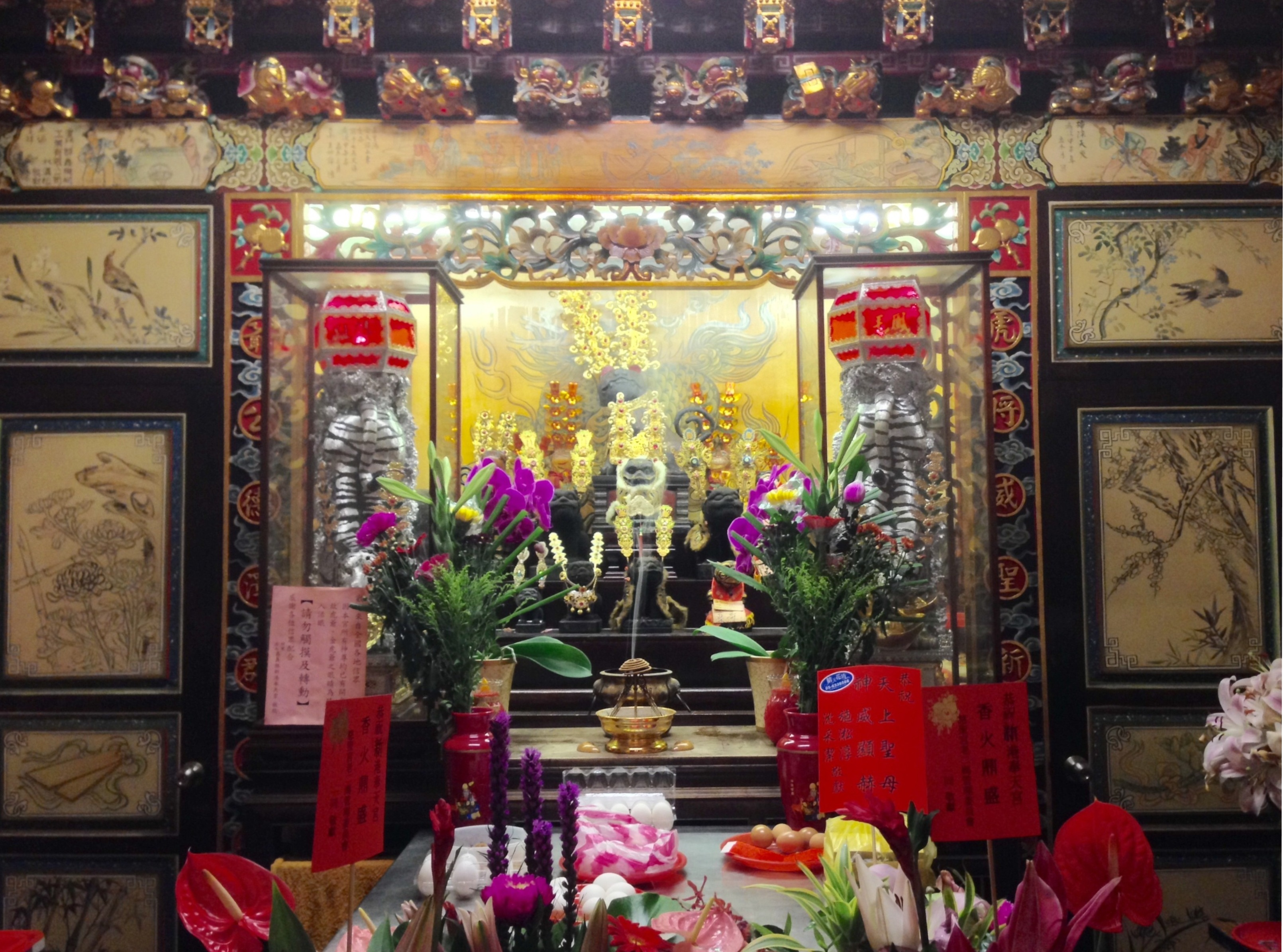 中文（台灣）: 新港奉天宮虎爺殿